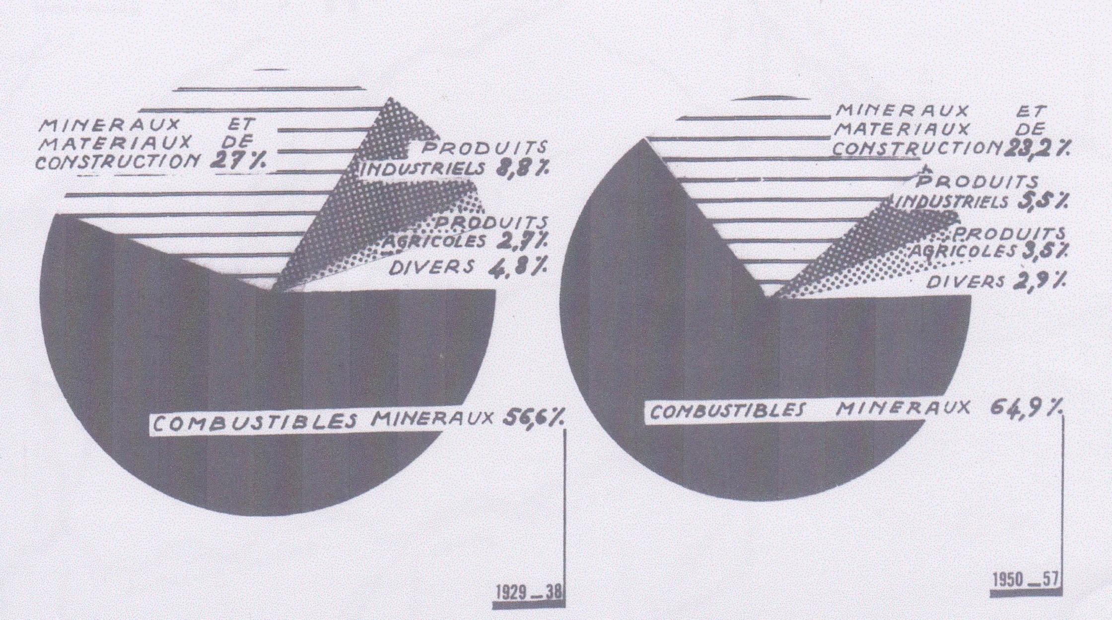 Canal del'Ourcq